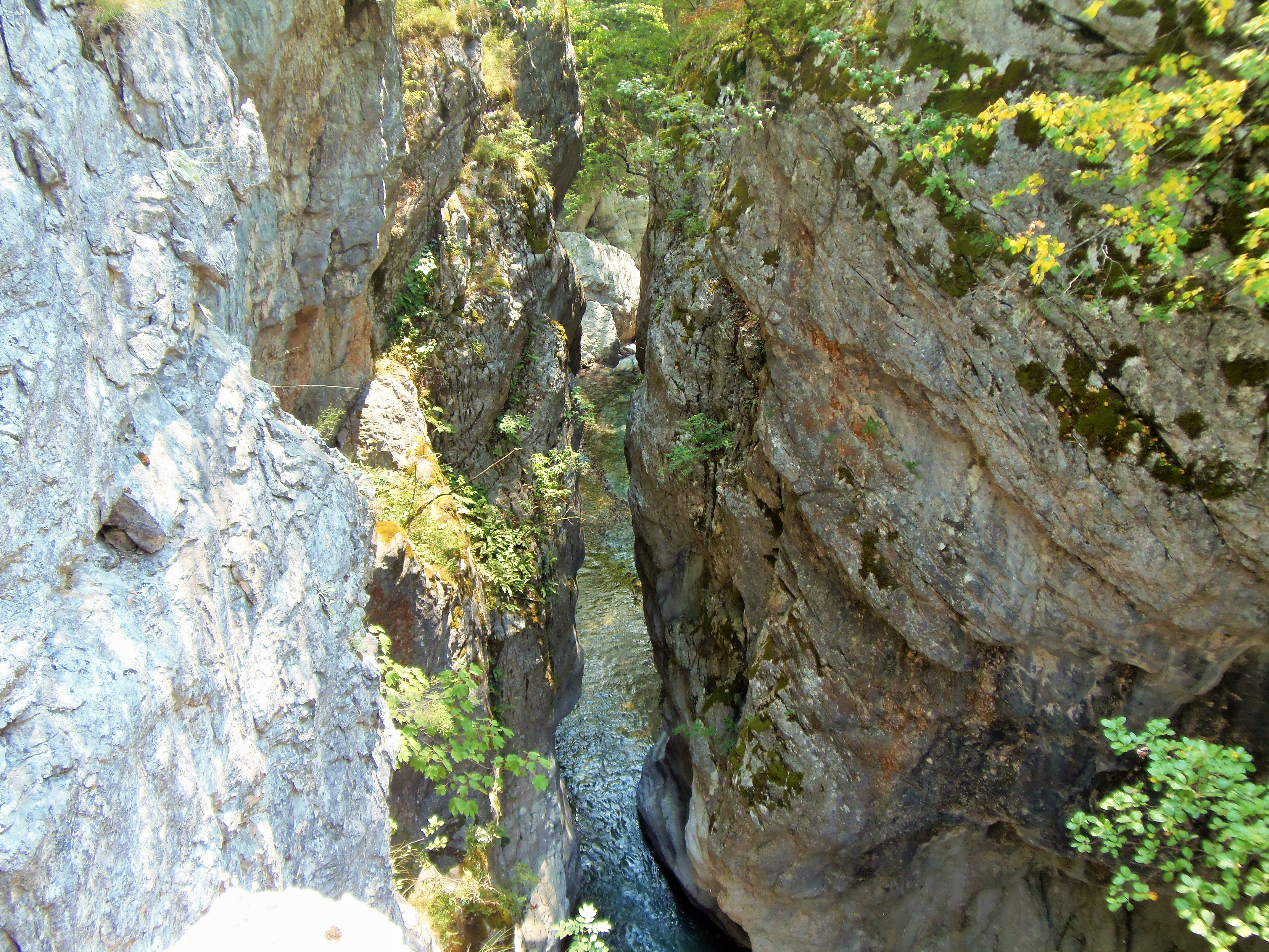 Thethi, Shkoder